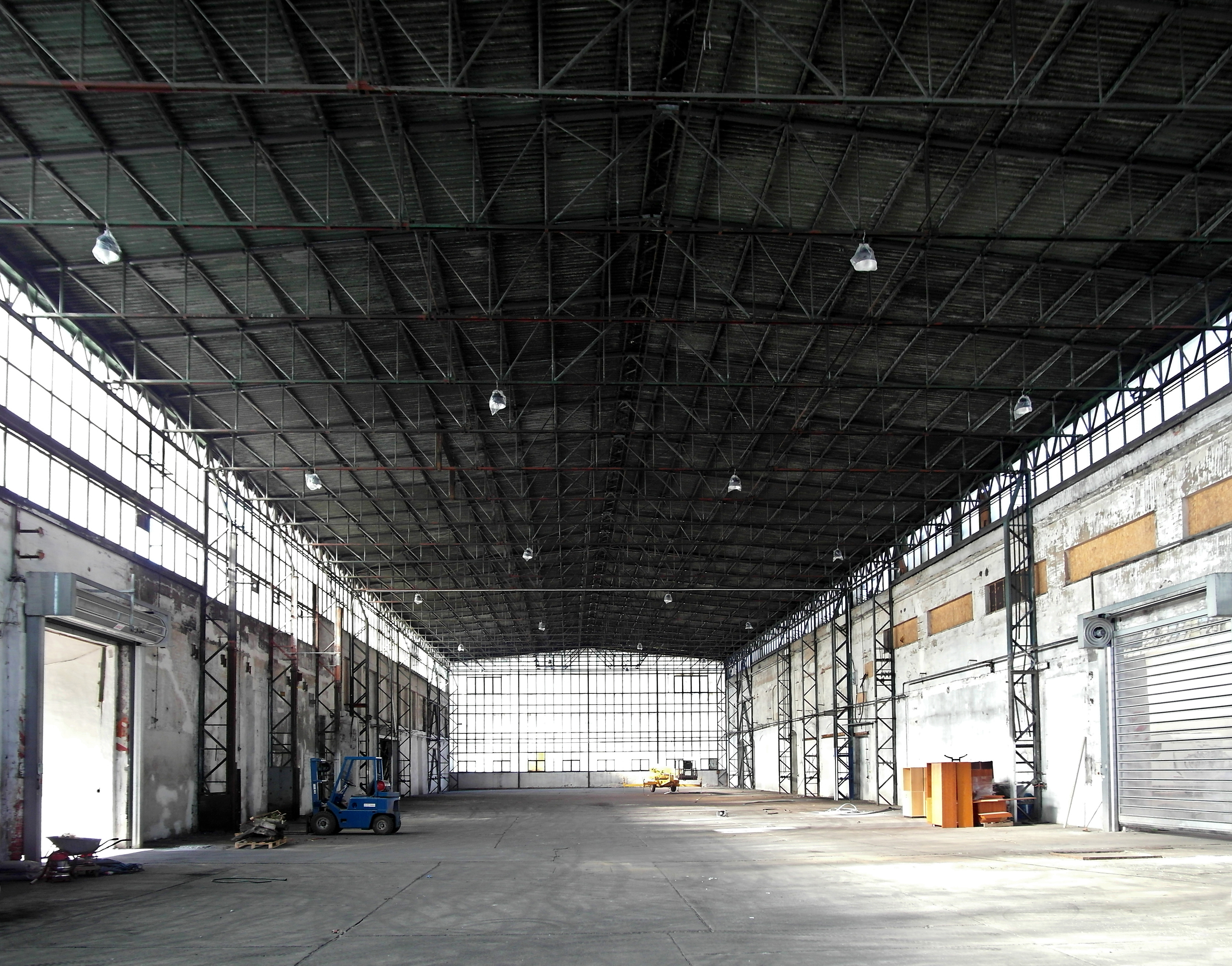 27.02.2019 01187 Dresden-Dölzschen: Tharandter Straße 199: König-Friedrich-August-Hütte. Leere Werkhalle (GMP: 51.016133,13.671158). Die Eisenhütte ist aus einem Hammerwerk hervorgegangen, das der Hammerschmied Johann Gottfried Ulbricht 1794 als Eisenhammer in Betrieb nahm. 1827 erwarb der Montanunternehmer Carl Friedrich August Dathe von Burgk das Hammerwerk und steigerte die Produktion wesentlich. In der DDR-Zeit stellte der VEB Eisenhammerwerk Dresden-Dölzschen Gußerzeugnissen für die Autoindustrie her. Seit 1993 firmierte das Werk als "EHD Eisenhammer Dresden GmbH & Co. KG", wurde aber 2013 insolvent und aufgelöst. [SAM9713.JPG]20190227210DR.JPG(c)Blobelt